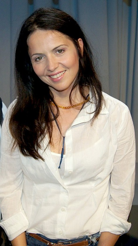 Agnieszka Michalska.